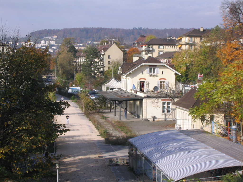 Bahnhof Zürich Letten